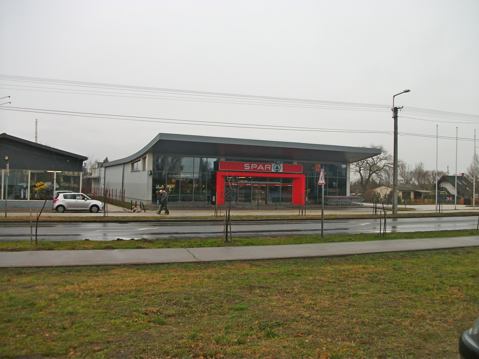 SPAR épülete Gárdonyban.